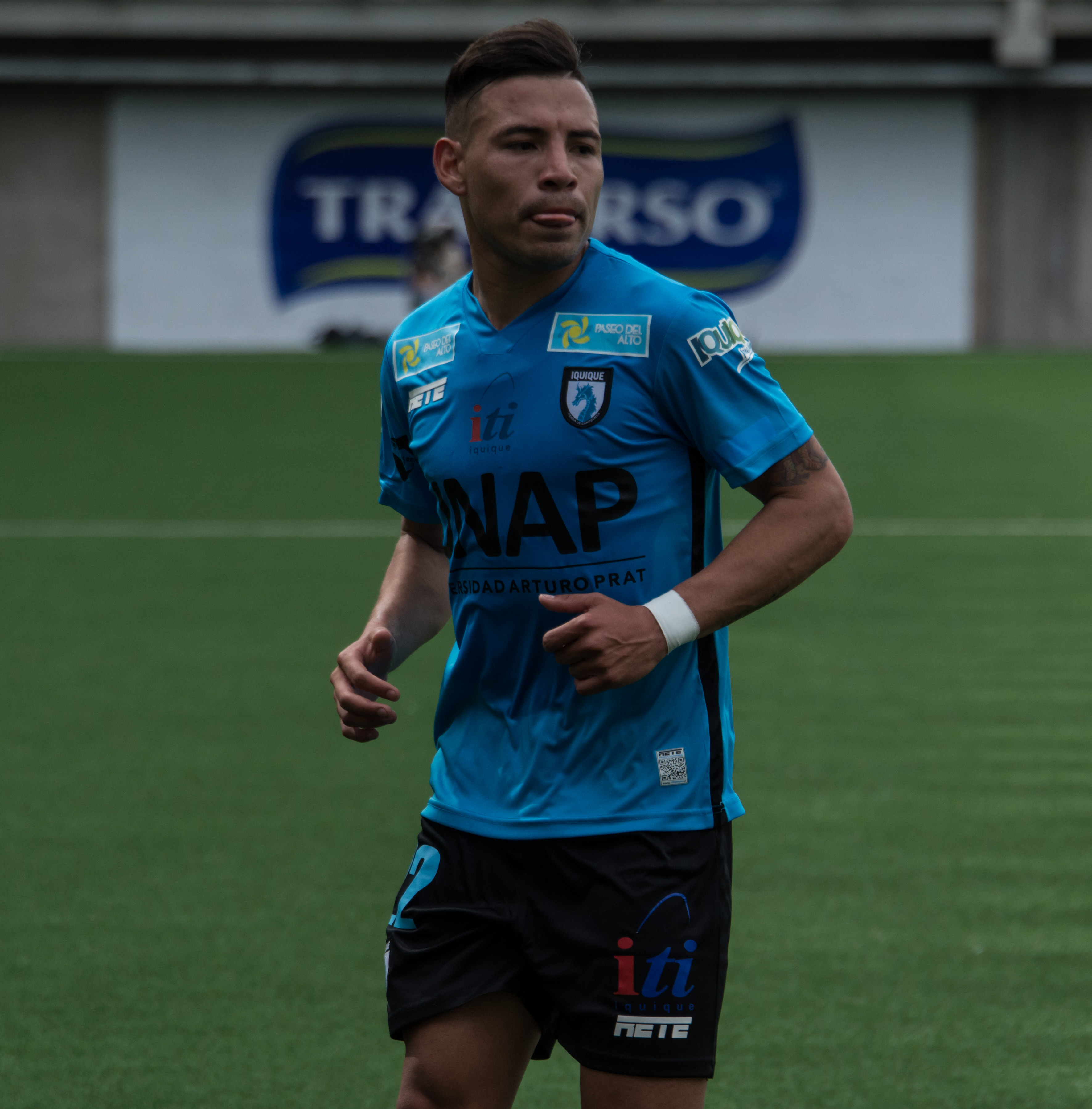 Leonardo Rolón, Audax Italiano v Deportes Iquique, Estadio Bicentenario de La Florida, La Florida, Santiago, Chile